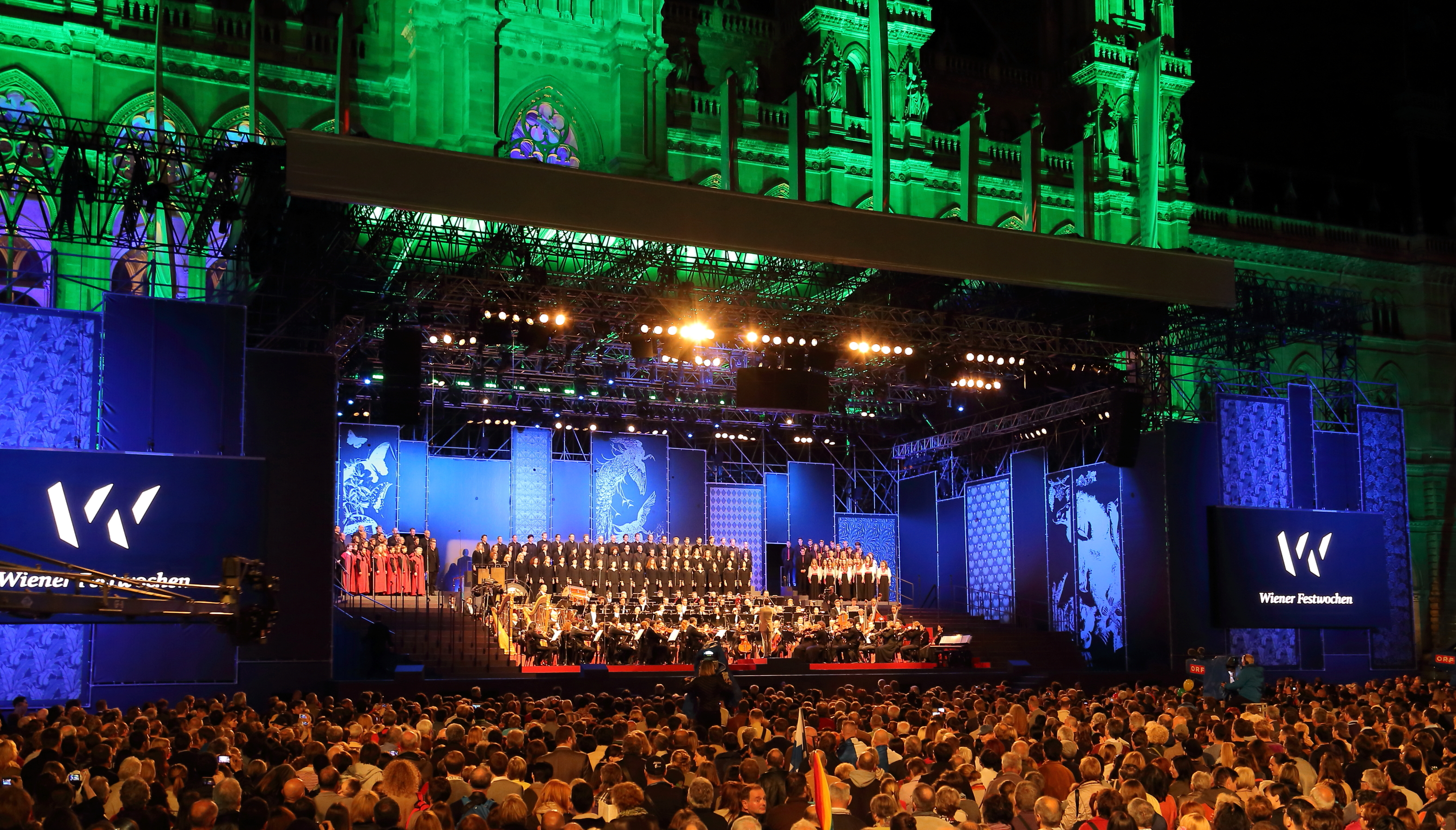 Eröffnungsveranstaltung der Wiener Festwochen 2014 am 9. Mai mit dem Arnold Schoenberg Chor und dem Radio-Symphonieorchester Wien unter der Leitung von Cornelius Meister. An Gastchören nahmen teil: BNR Mixed Coir aus Bulgarien, Concordia Discors aus Kroatien, coro siamo aus Österreich, Euga aus Finnland, La Maîtrise de Paris aus Frankreich, Liepaites aus Litauen, Sola aus Lettland und Vox Bona aus Deutschland. Die Moderatoren Cornelius Obonya und Alice Tumler führten durch die Veranstaltung.